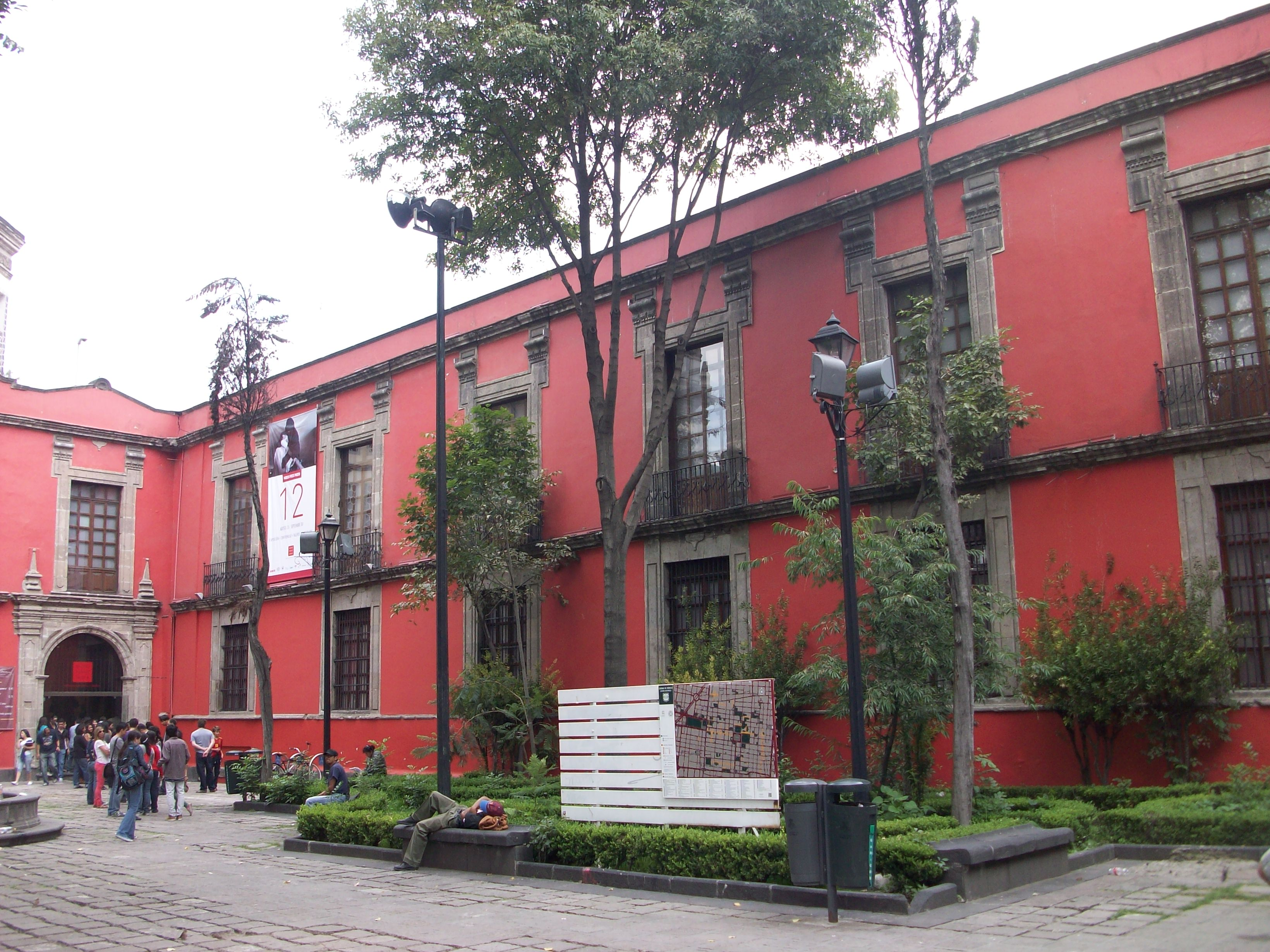 Ex Hospital de San Juan de Dios o Ex Hospital de la Mujer